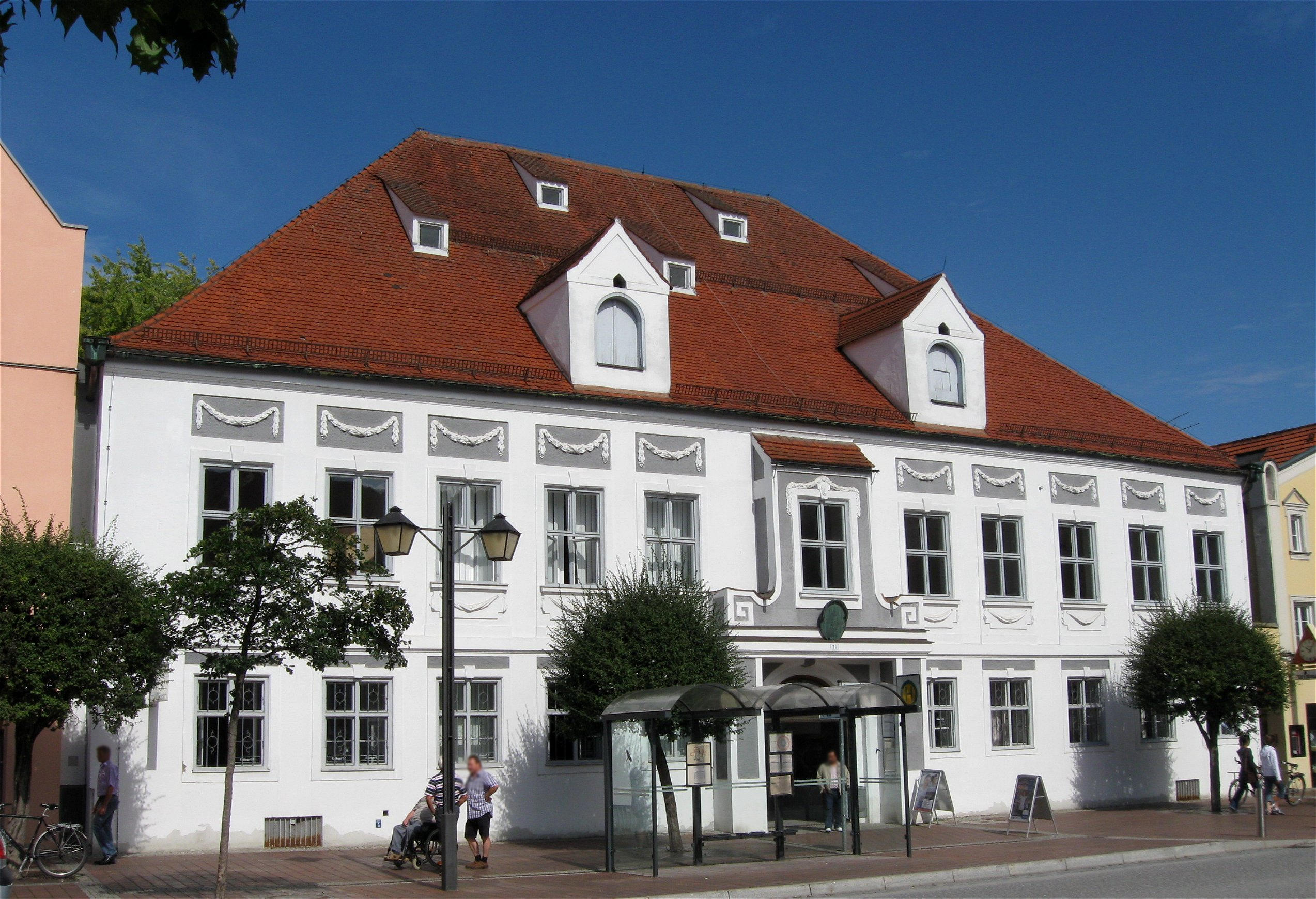 Lange Zeile 10. Landratsamt, ehem. Palais des Freiherrn von Widmann, klassizistisch, Fassade 1782.